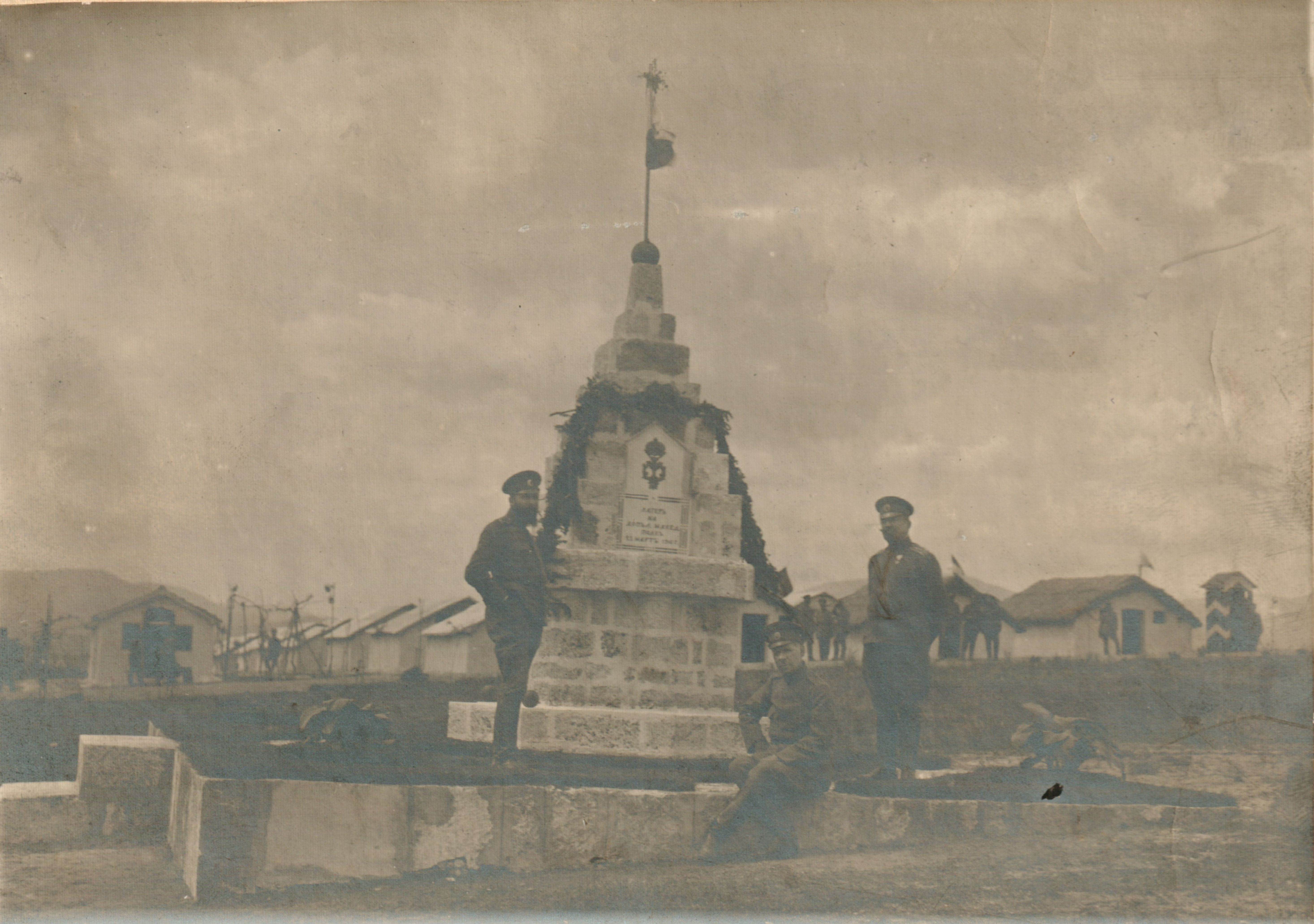 Снимка на лагер на допълн. Македонски полк, Скопие